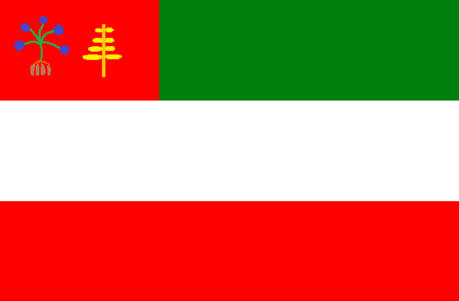 Bandeira do município de Matinha